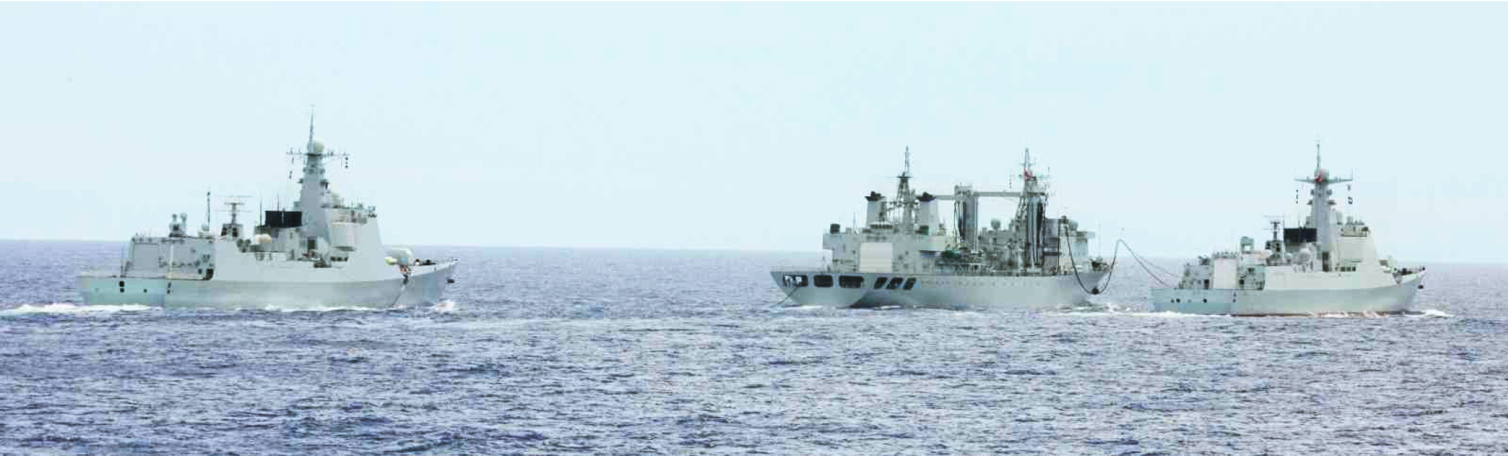 洋上補給中のルーヤンII級ミサイル駆逐艦（１７０）（左）及びルーヤンIII級ミサイル駆逐艦（１７４）（右）及びフチ級補給艦（９６３）（中）